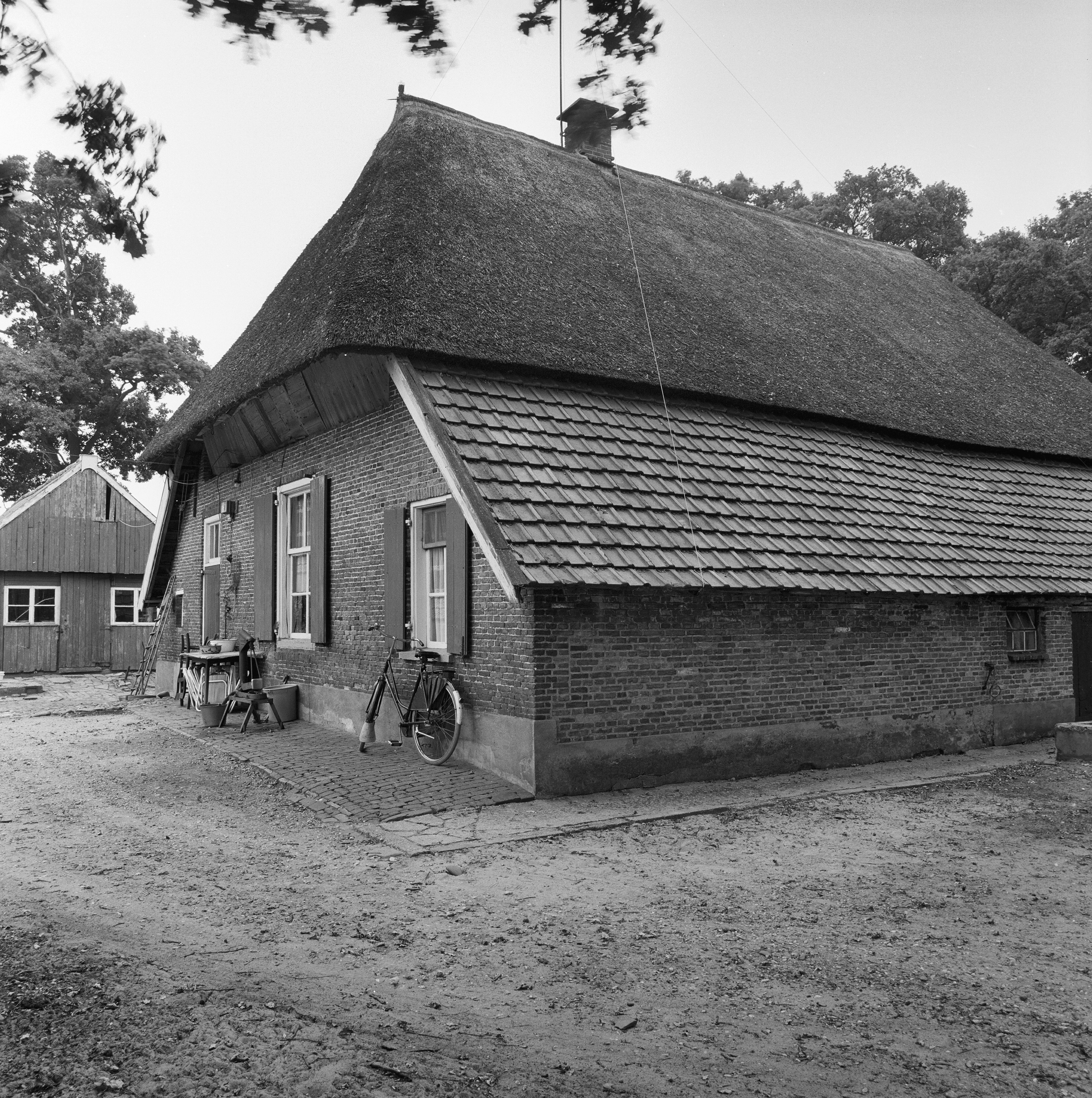 voor- en rechter zijgevel